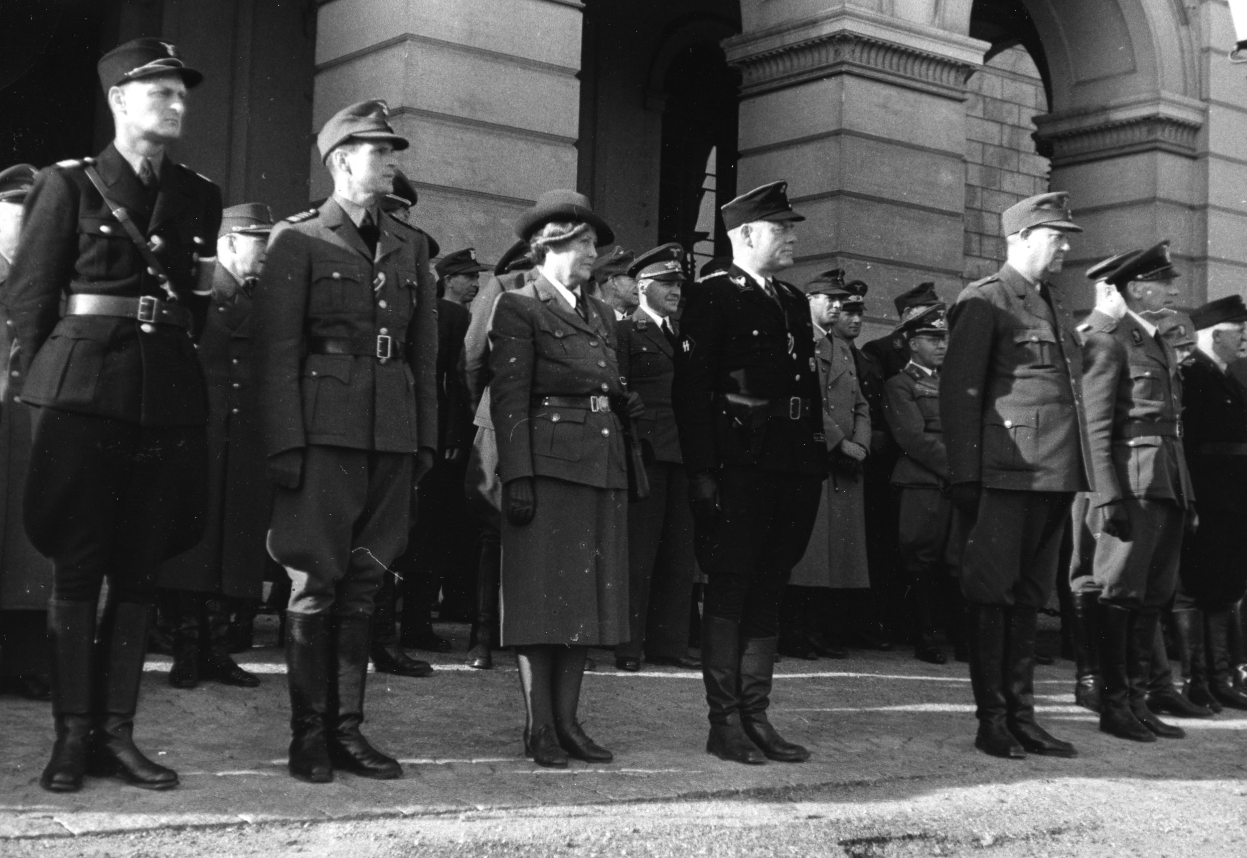 RA/PA-1209/Ue 91/ (img033)